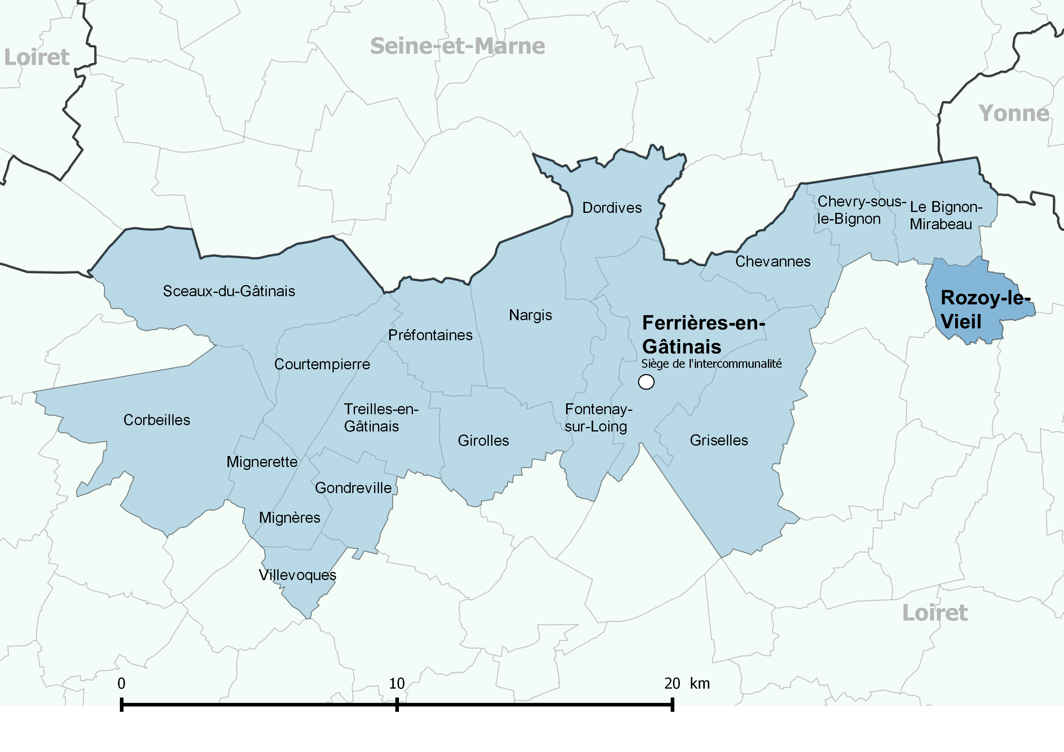 Périmètre de la communauté de communes des Quatre Vallées (Loiret) - Positionnement de la commune de Rozoy-le-Vieil.